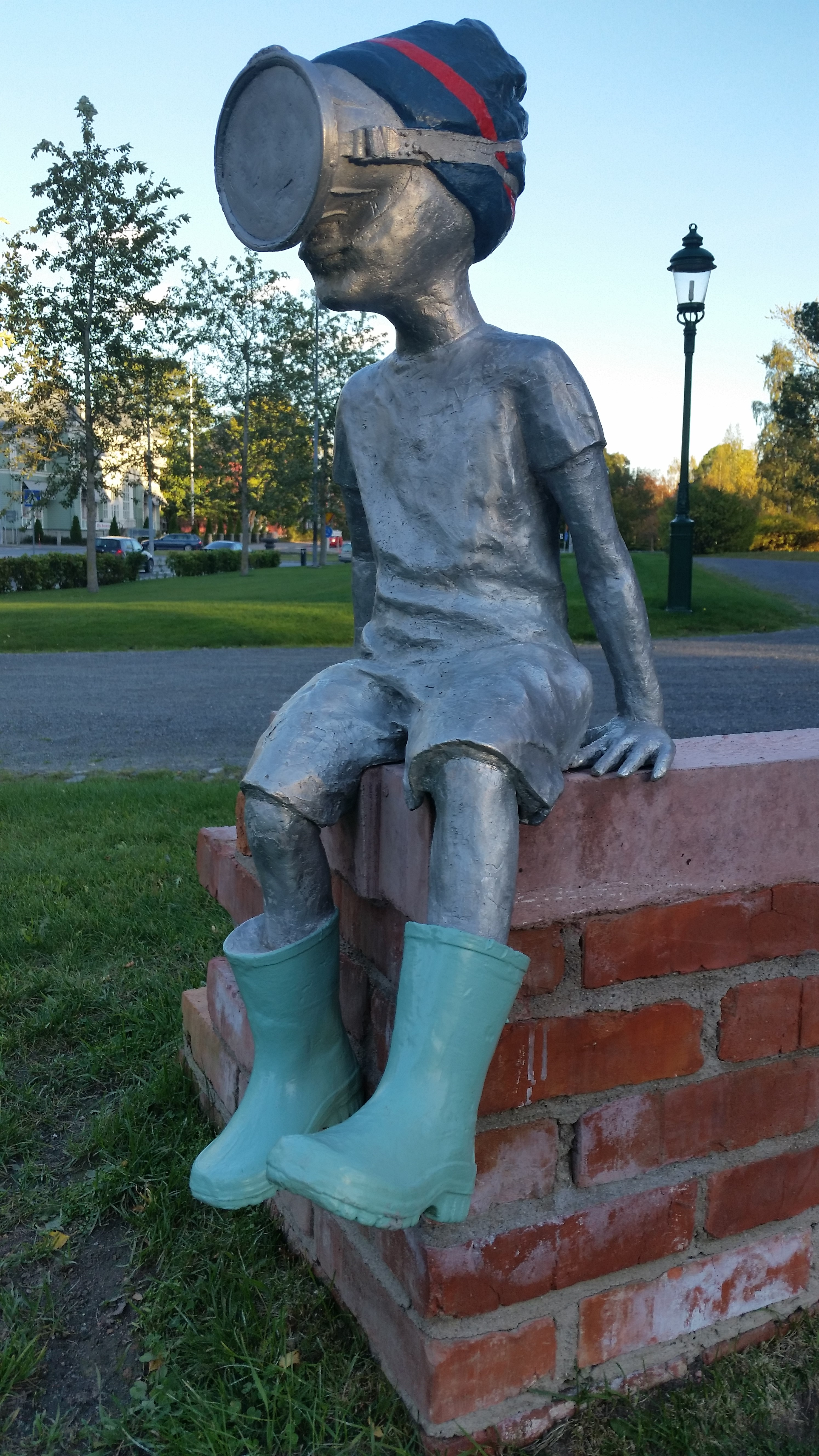 Skulptur av Mikael Åberg, vid Umeå stads kyrka